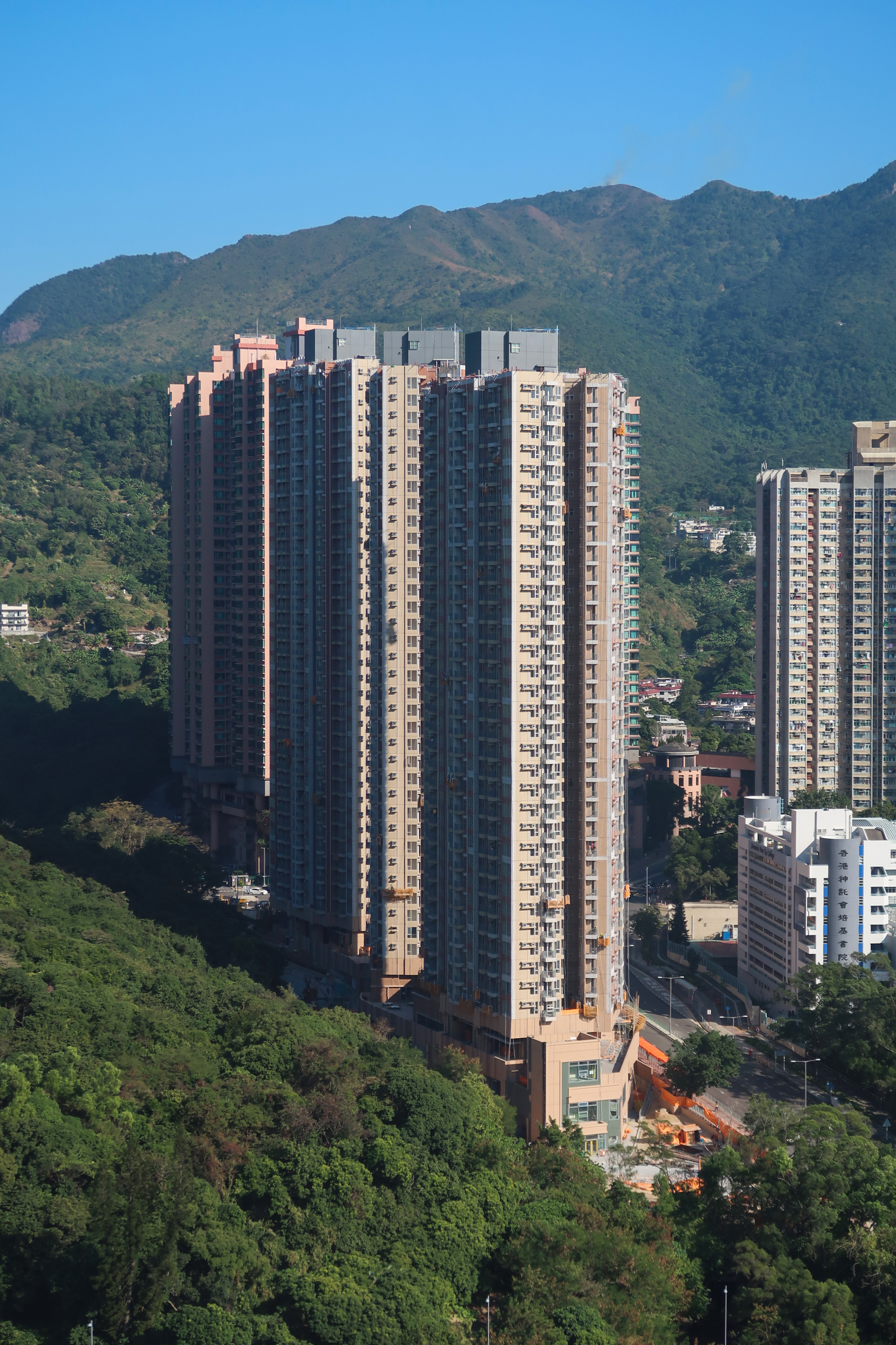 Greenhill Villa site